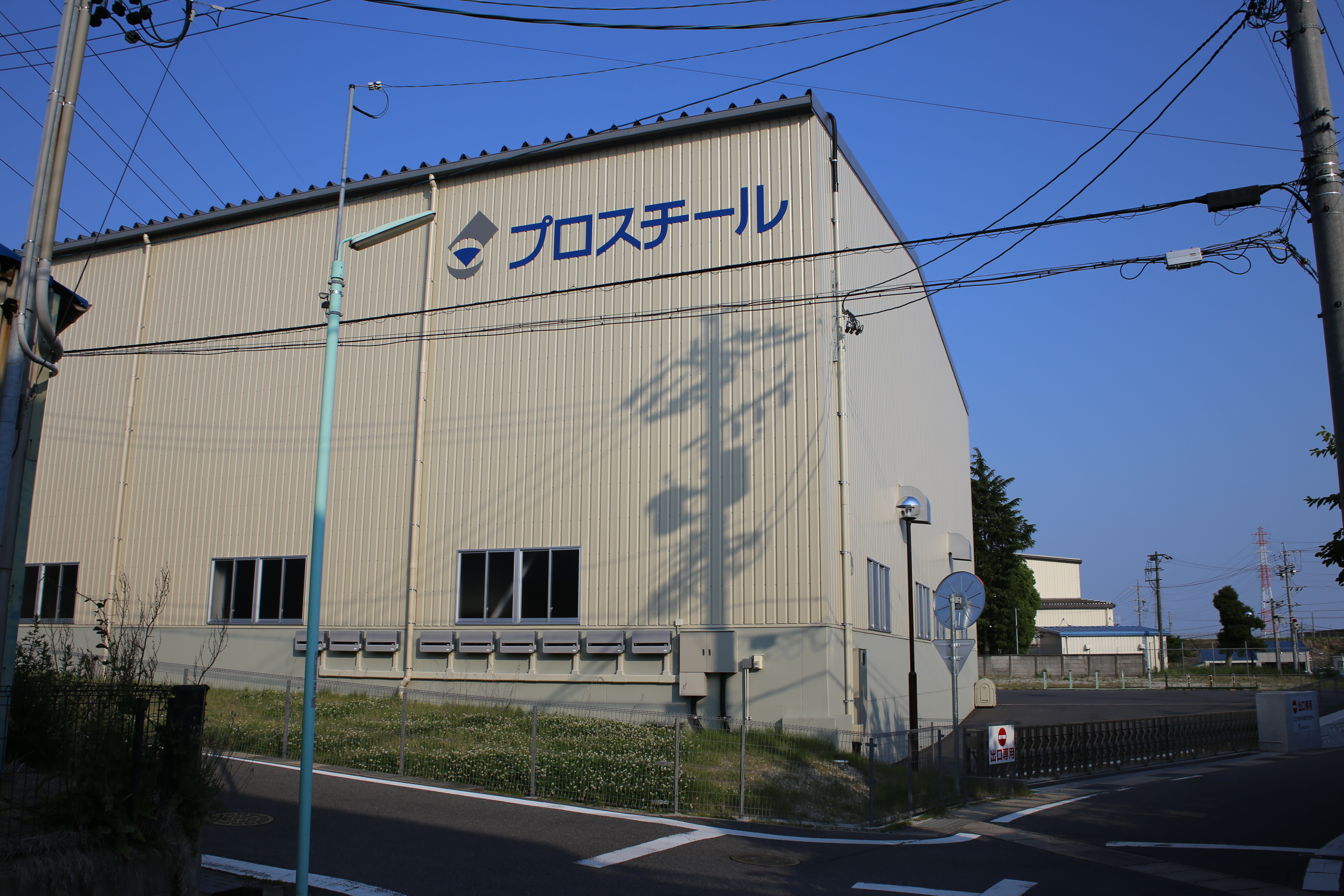 名古屋市緑区大根山のプロスチール本社を西側公道より撮影